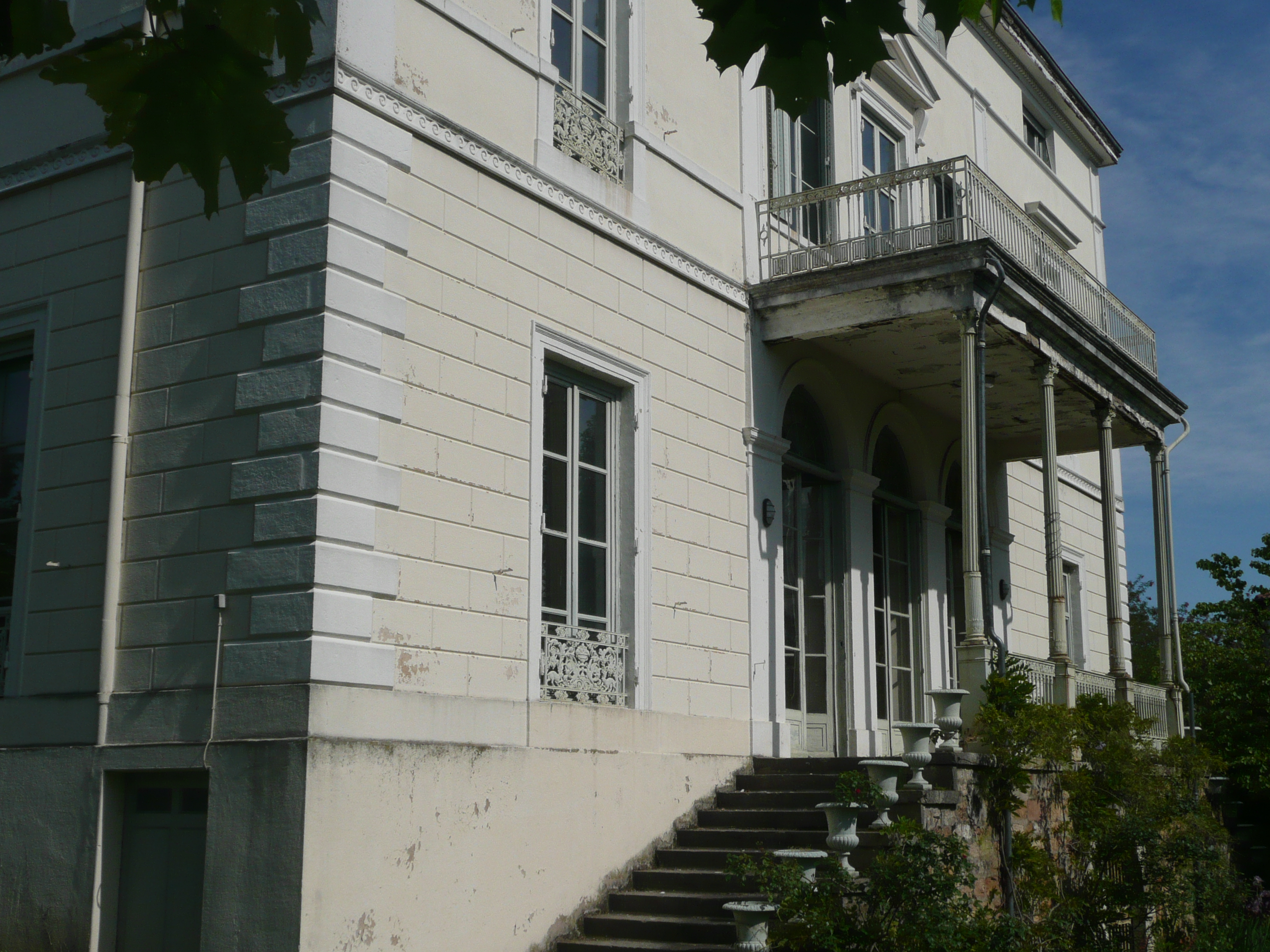 Grand escalier de la villa Ingouville à Lyon